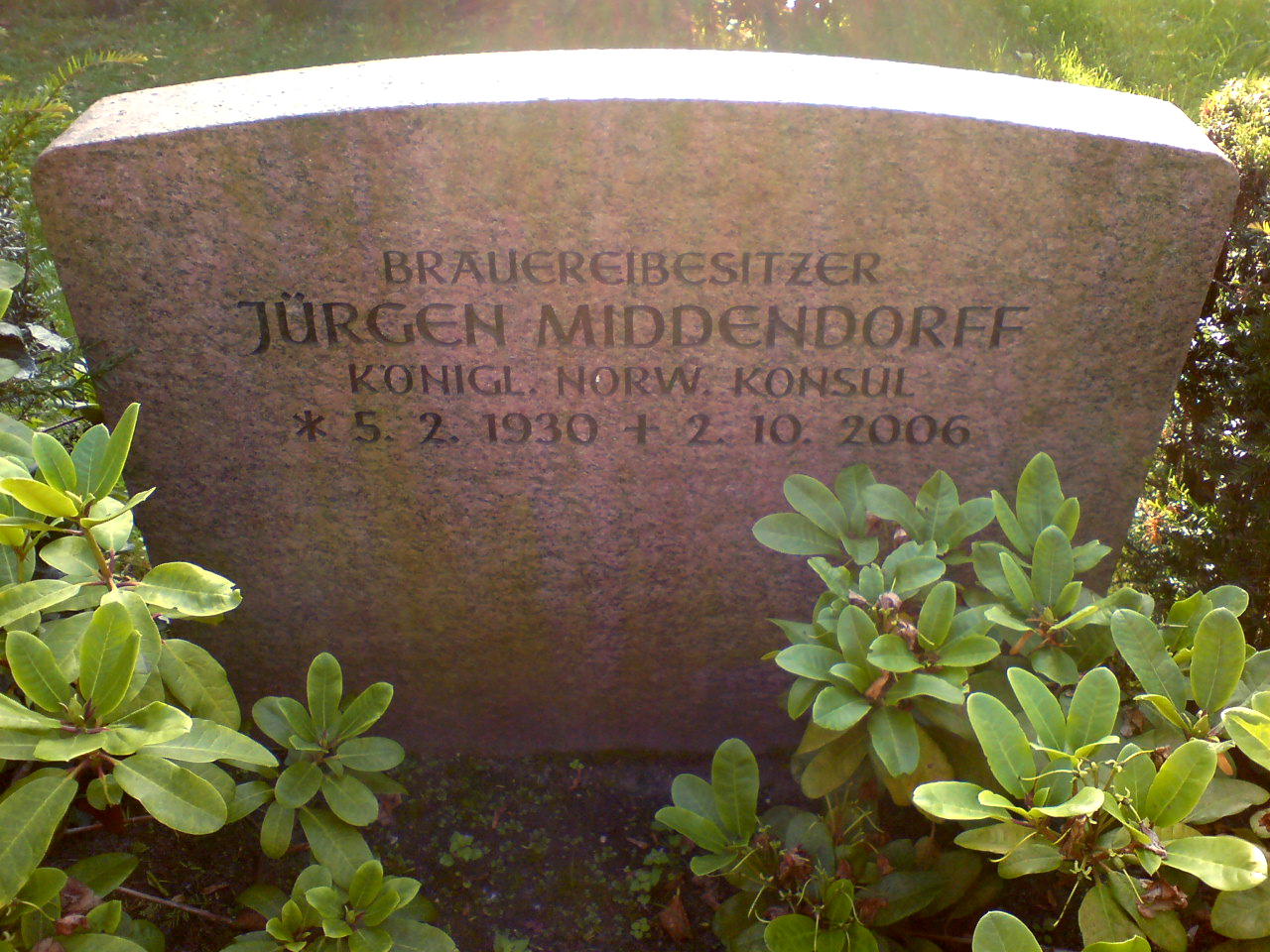 Grabstein von Brauereibesitzer Jürgen Middendorff, Königlich Norwegischer Konsul, auf dem Herrenhäuser Friedhof in Hannover ...